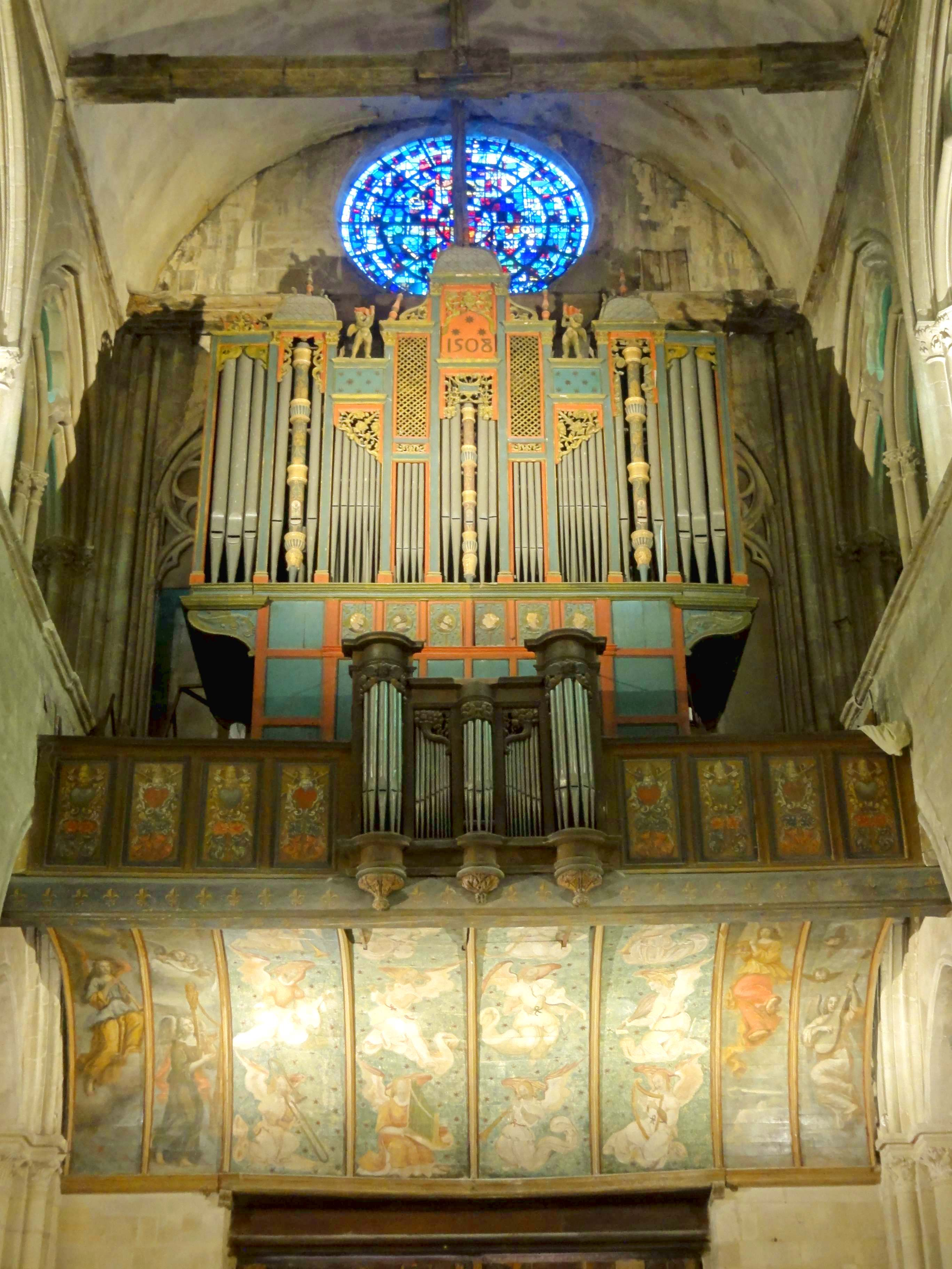 Mobilier de l'église - voir titre.